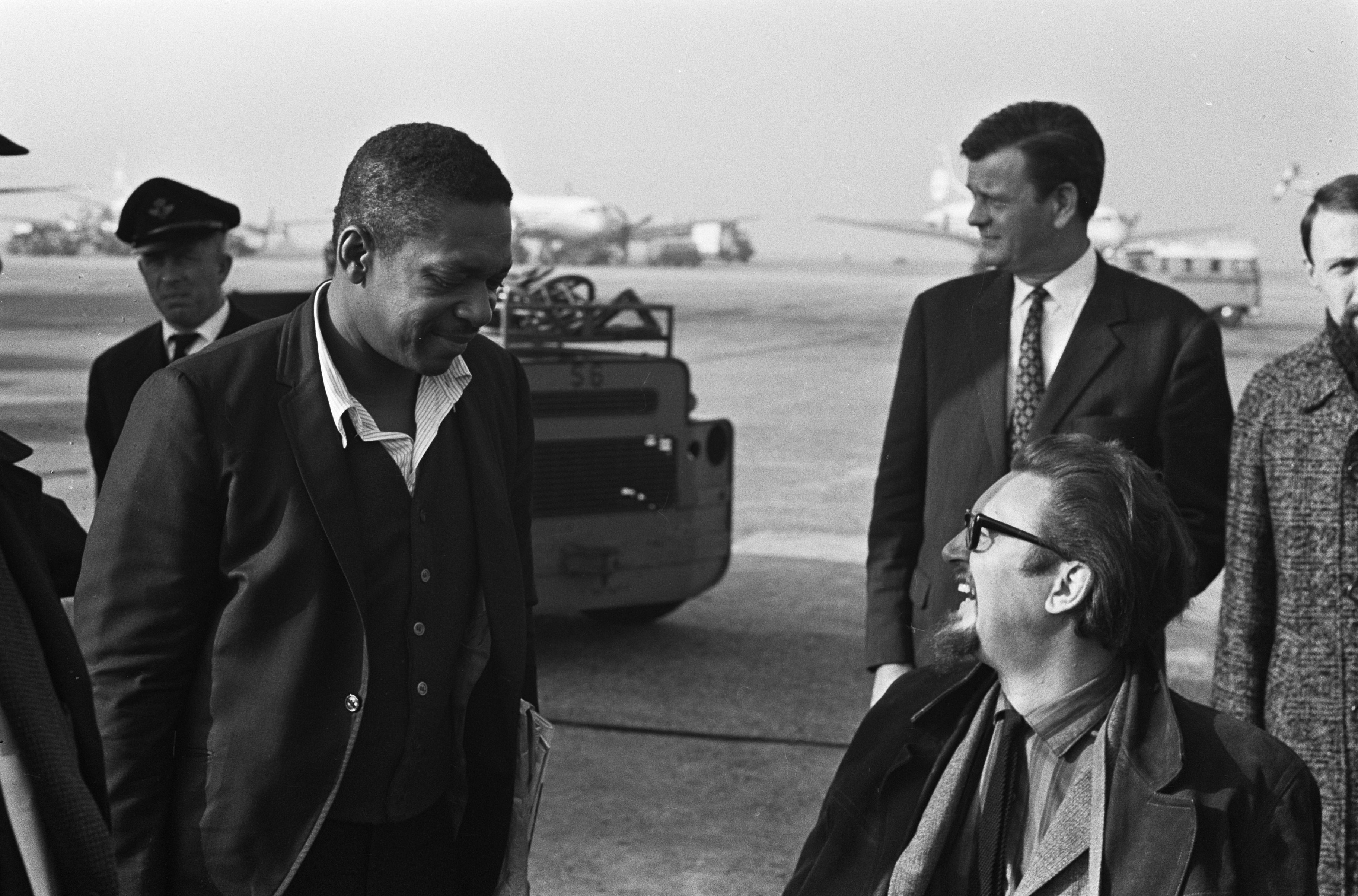 Collectie / Archief : Fotocollectie Anefo Reportage / Serie : [ onbekend ] Beschrijving : Amerikaanse jazz-saxofonist John Coltrane op Schiphol aangekomen. Rechts Michiel de Ruyter Datum : 26 oktober 1963 Trefwoorden : aankomsten, saxofonisten Persoonsnaam : Ruyter, Michiel Adriaansz. de Fotograaf : Gelderen, Hugo van / Anefo Auteursrechthebbende : Nationaal Archief Materiaalsoort : Negatief (zwart/wit) Nummer archiefinventaris : bekijk toegang 2.24.01.05 Bestanddeelnummer : 915-6746